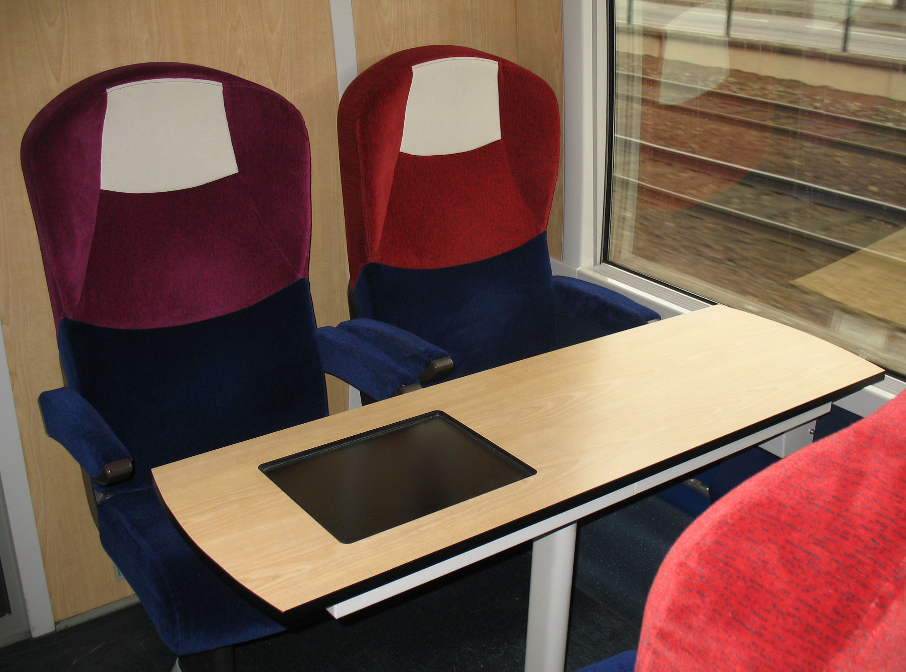 Le mooviTER, nouvelle rame de Transport express régional (TER) inaugurée le 10 octobre 2008 et circulant dans la région Bretagne sur la ligne Brest-Rennes. Photo prise en deuxième classe.